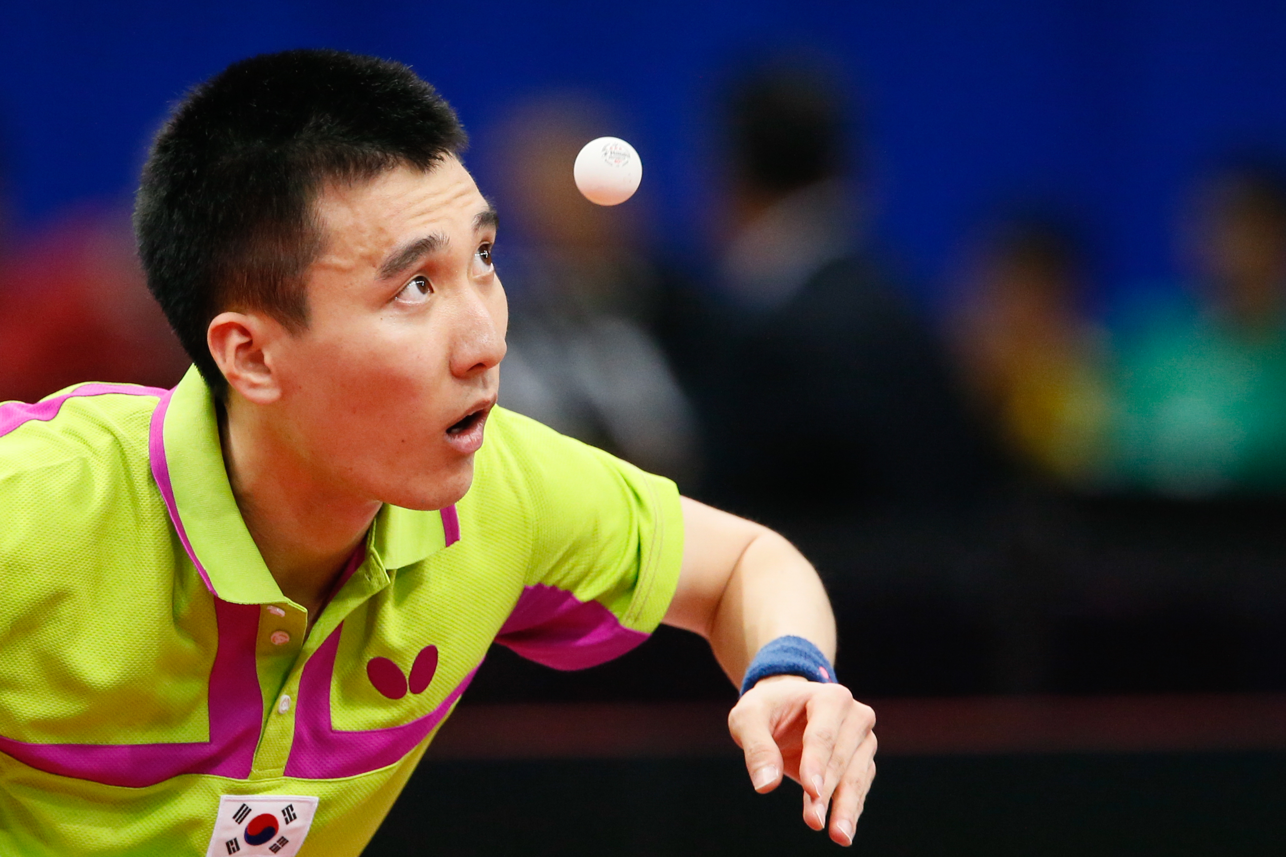 _K0K0097